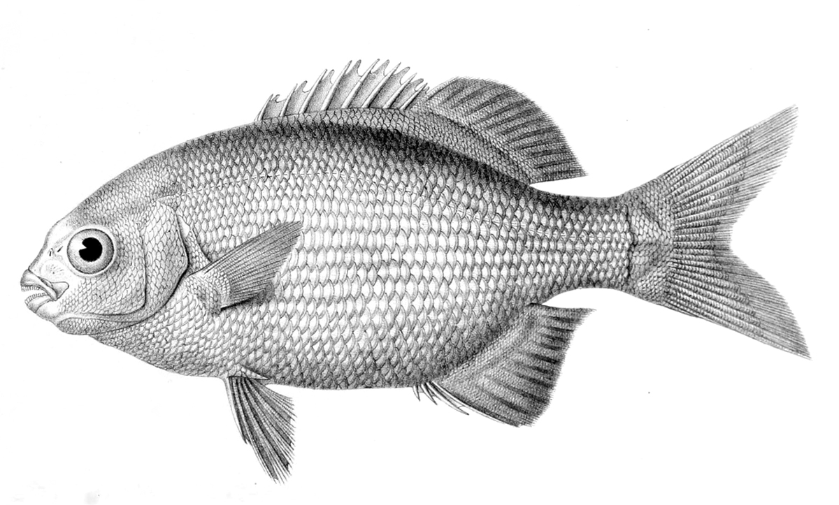 Kyphosus cinerascens